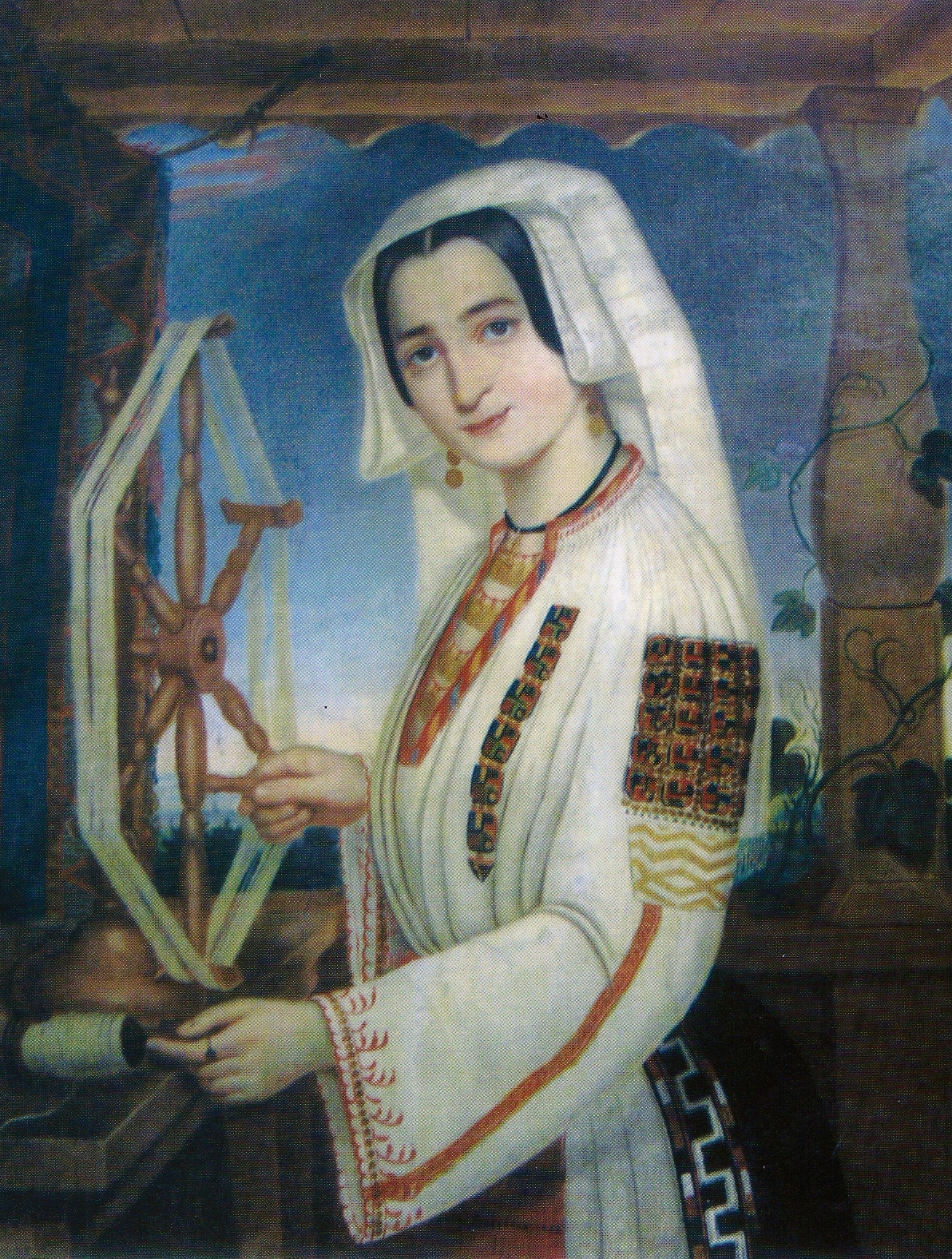 Maria Bibescu, (n. Marițica Văcărescu), soția domnitorului Gheorghe Bibescu, Muzeul Național de Artă al României